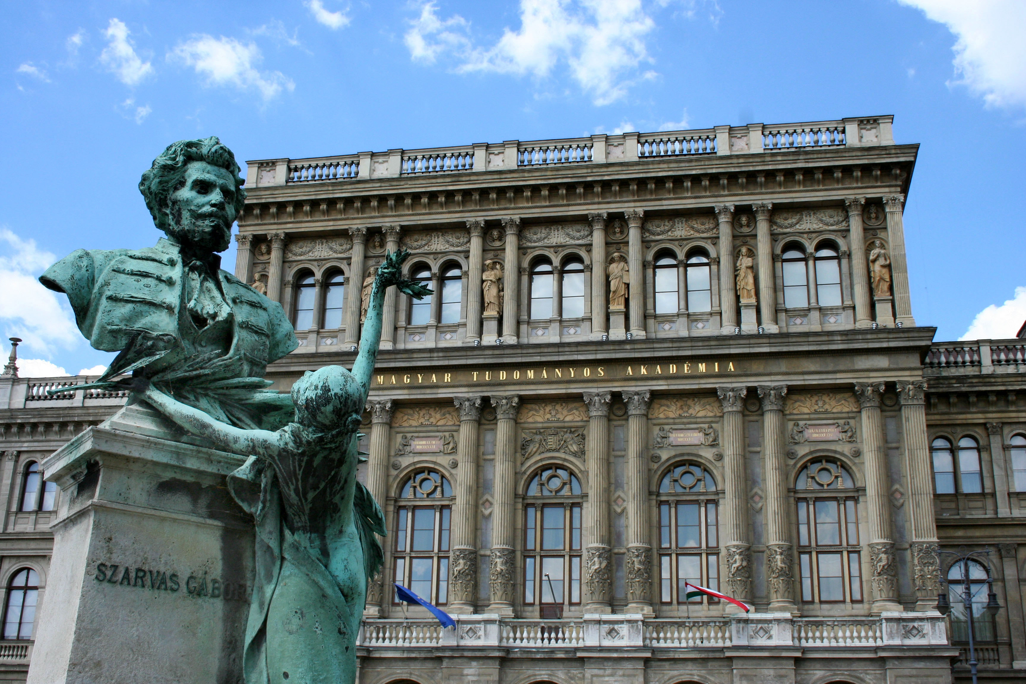 Budapest, Magyar Tudományos Akadémia épülete, Szarvas Gábor szobrával